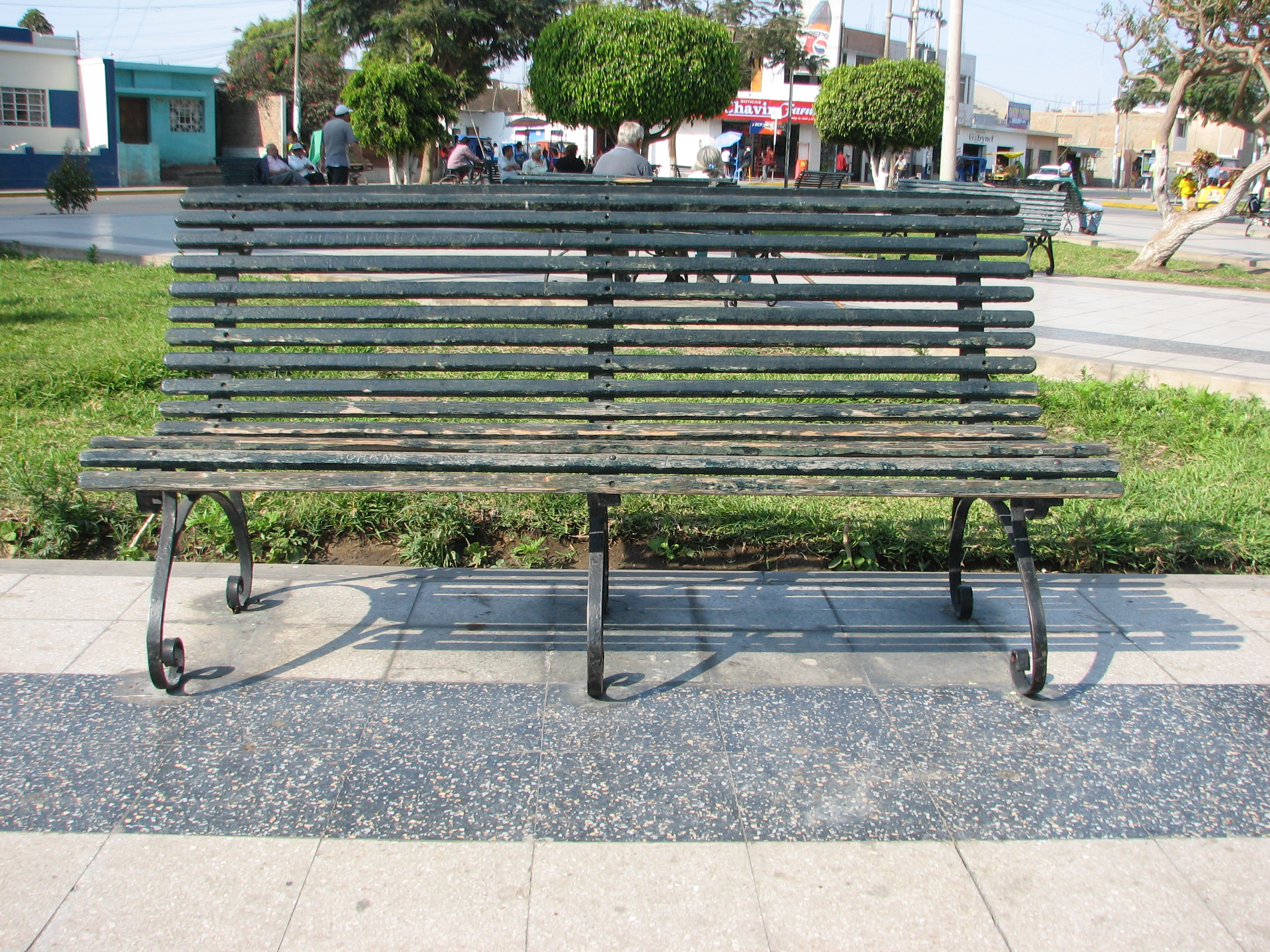 Bench on Plaza de Armas in Casma/Casma/Casma, Peru.